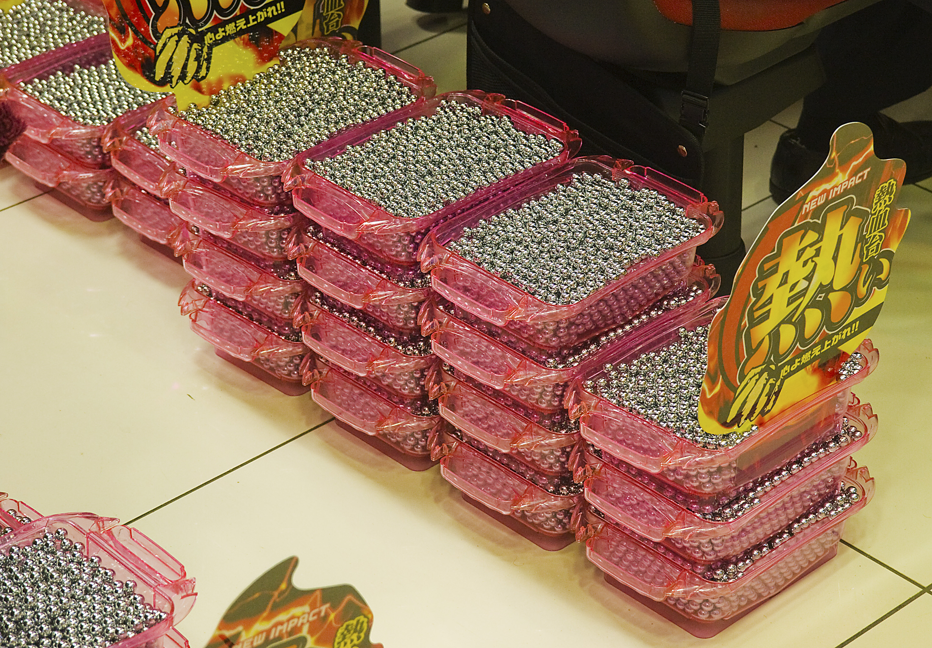 Pachinko balls